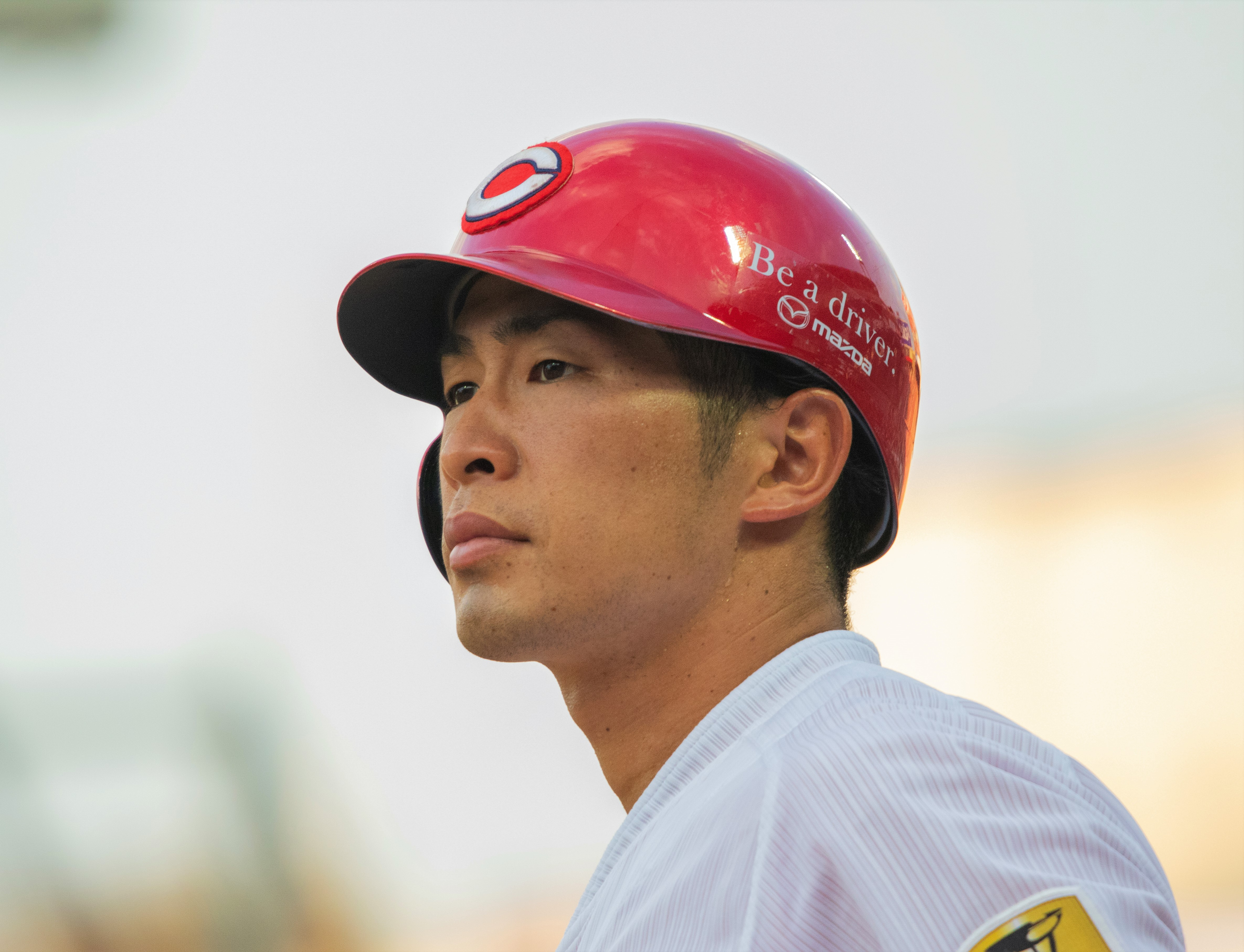 2018/7/28 マツダスタジアム